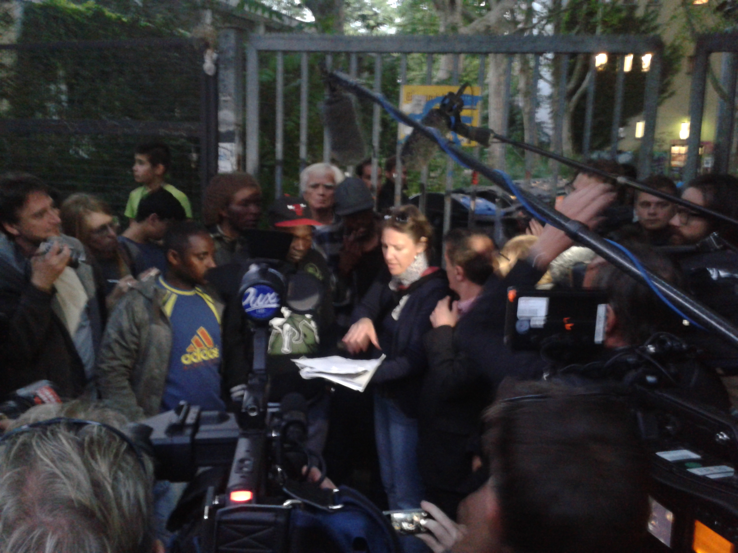 Flüchtlinge aus der besetzten Gerhart-Hauptmann-Schule unterzeichnen die Einigung mit dem Bezirksamt Friedrichshain-Kreuzberg.